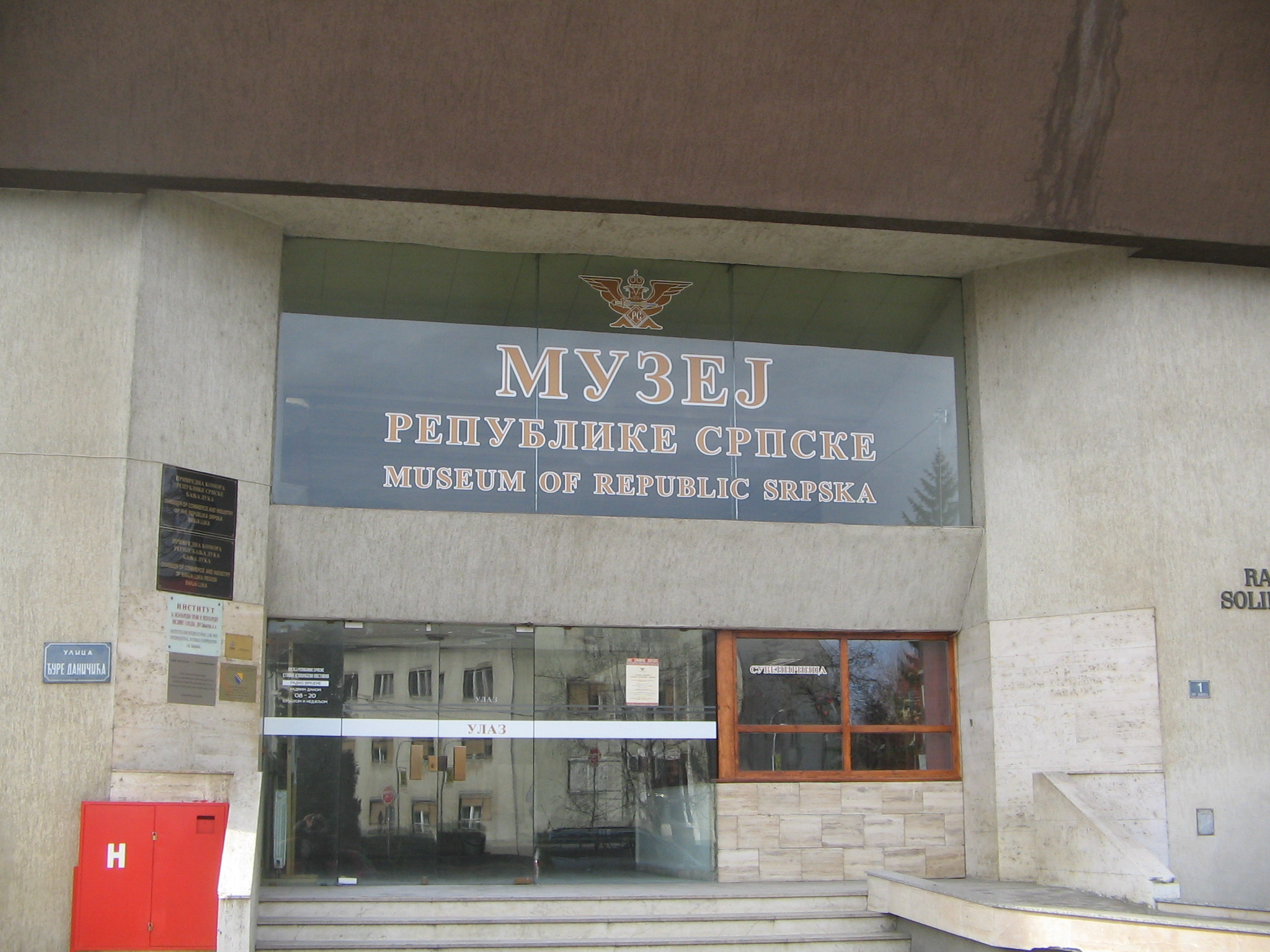 Muzej_Republike_Srpske